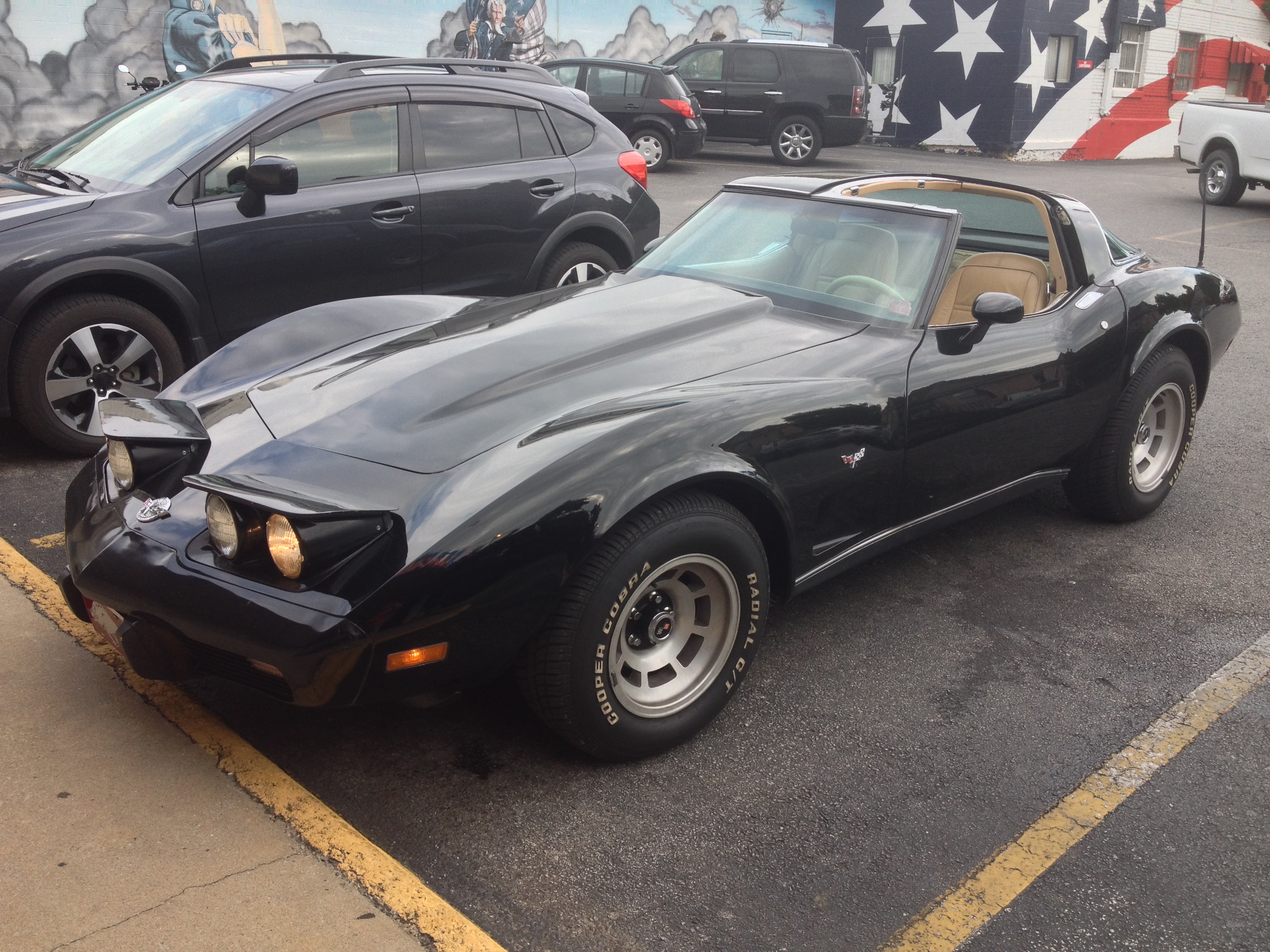 Fayetteville Arkansas USA.